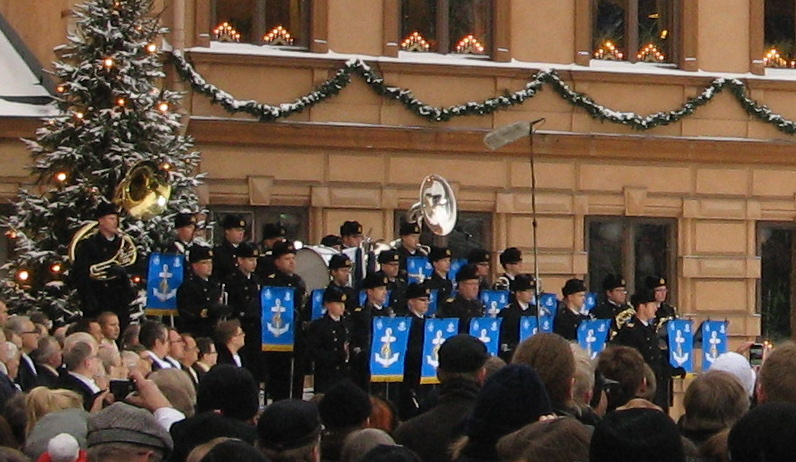 Laivaston soittokunta joulurauhan julistuksessa